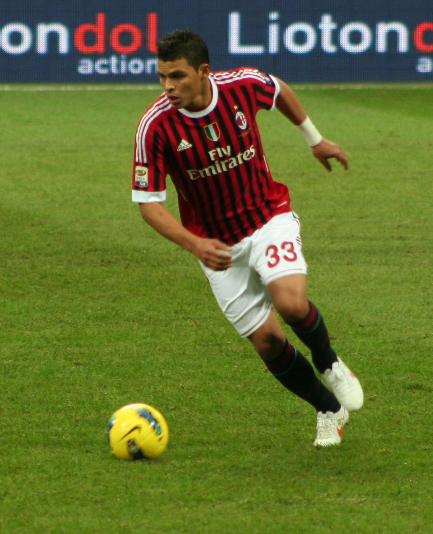 Thiago Silva. Partita Milan-Siena stagione 2011-2012